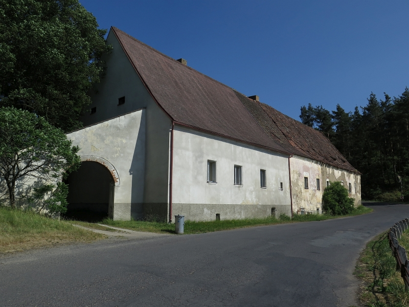 Tvrz, Frymburk 1, Frymburk (okres Klatovy).